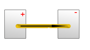 Conducción electrónica cuánticamente delimitada a través de un nanohilo unido a dos electrodos